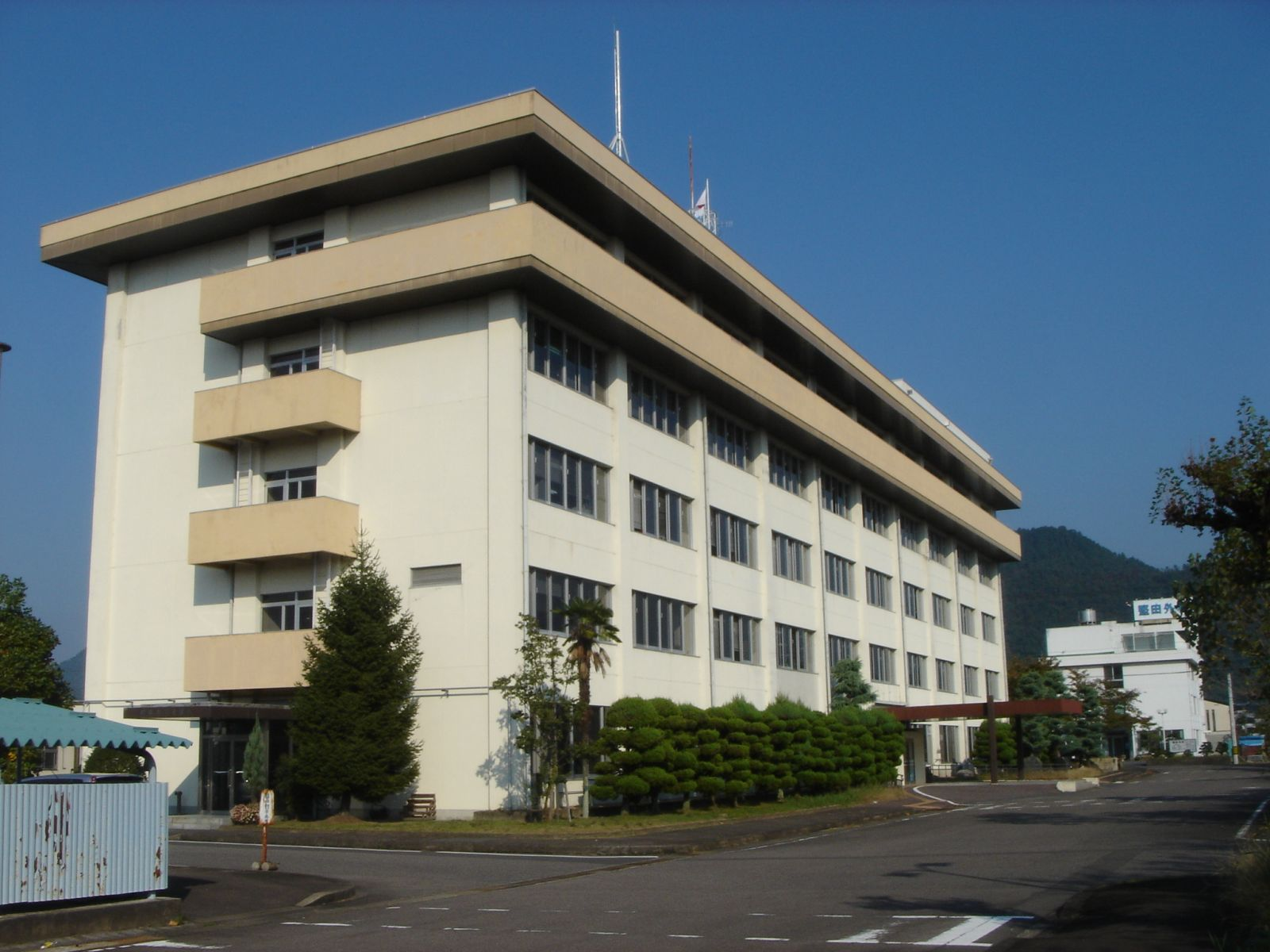 （中濃総合庁舎）,Mino,Gifu,Japan(岐阜県美濃市)で撮影。